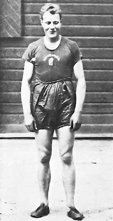 Paavo Yrjölä sonnustatuneena suojeluskuntien urheiluasuun